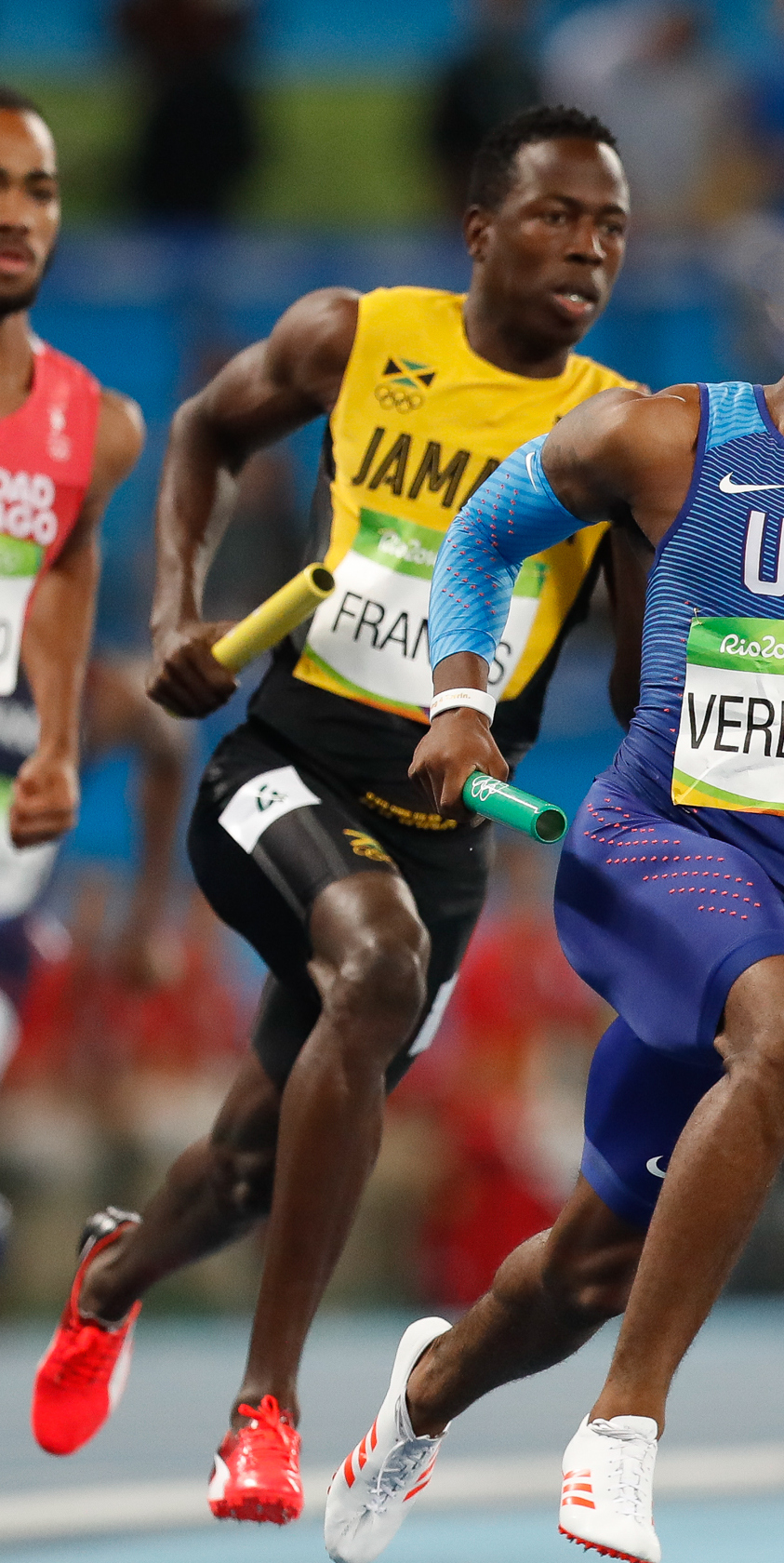 Rio de Janeiro - Eliminatórias do revezamento 4 x 400m nos Jogos Rio 2016, no Estádio Olímpico (Fernando Frazão/Agência Brasil)